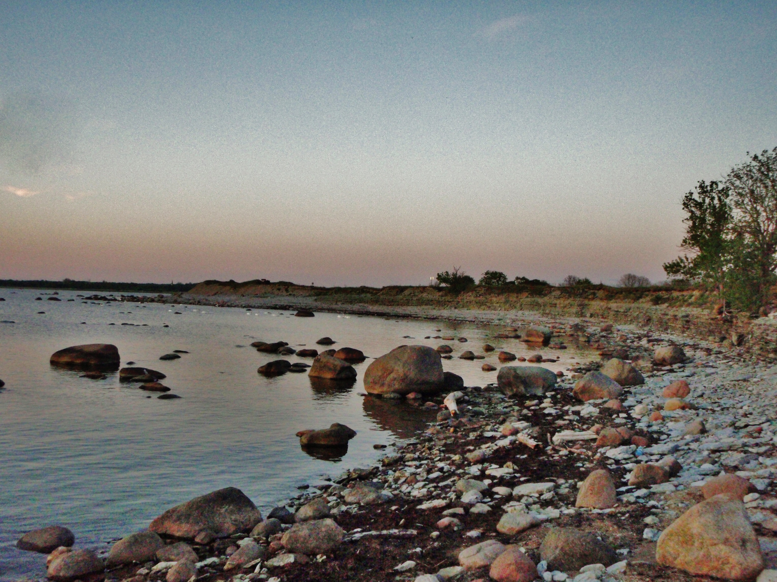 Pildistatud Saaremaal, Sõrve poolsaarel, Torgu vallas, Ohessaare külas.